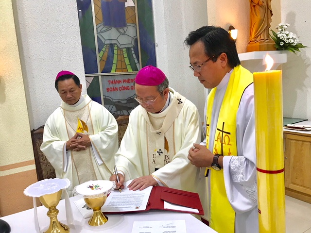 Giám mục Giuse Trần Văn Toản và Tổng Giám mục Phaolô Bùi Văn Đọc, 2017